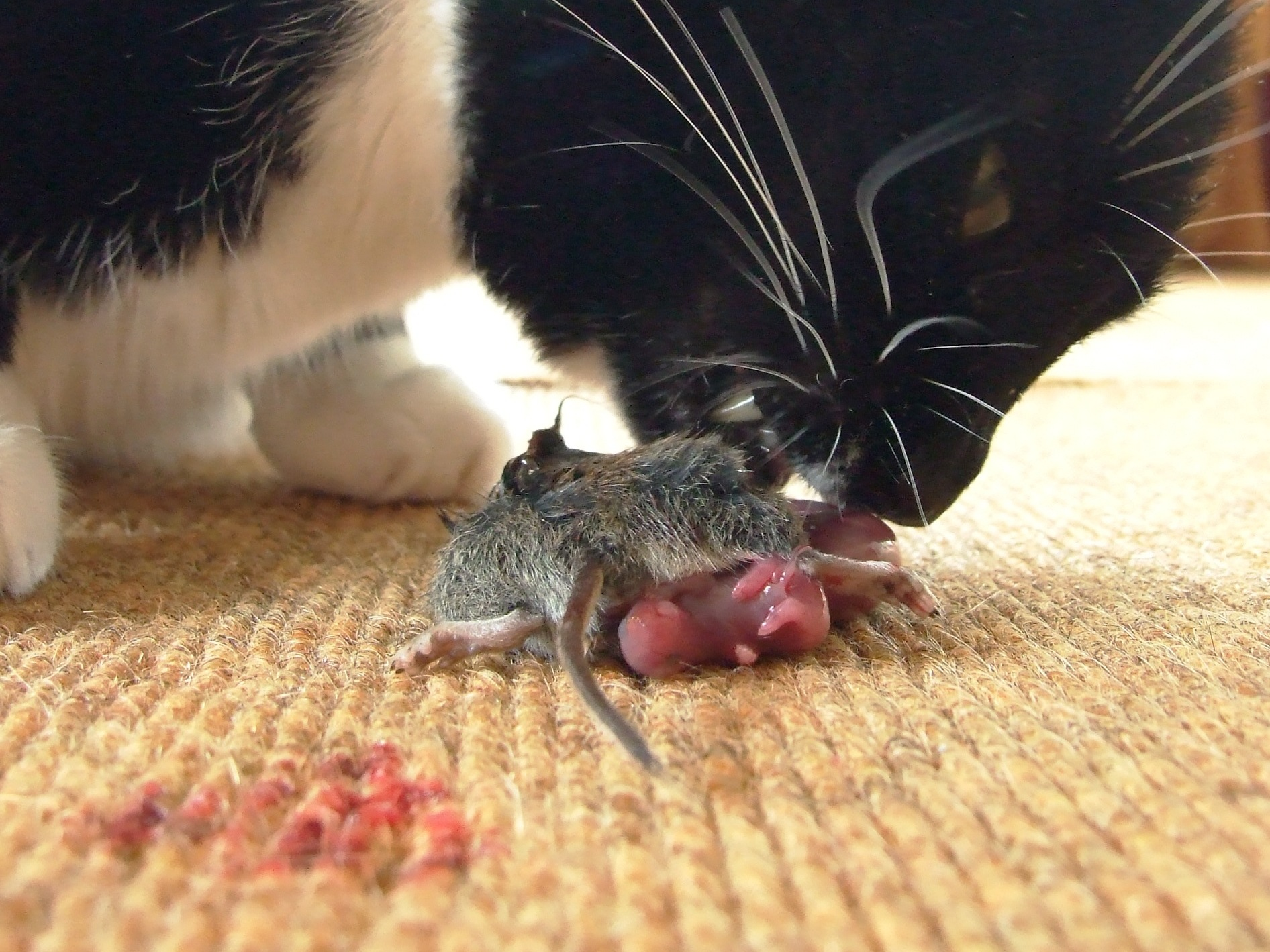 Katze verspeist schwangere Maus samt Embryonen auf dem Teppich